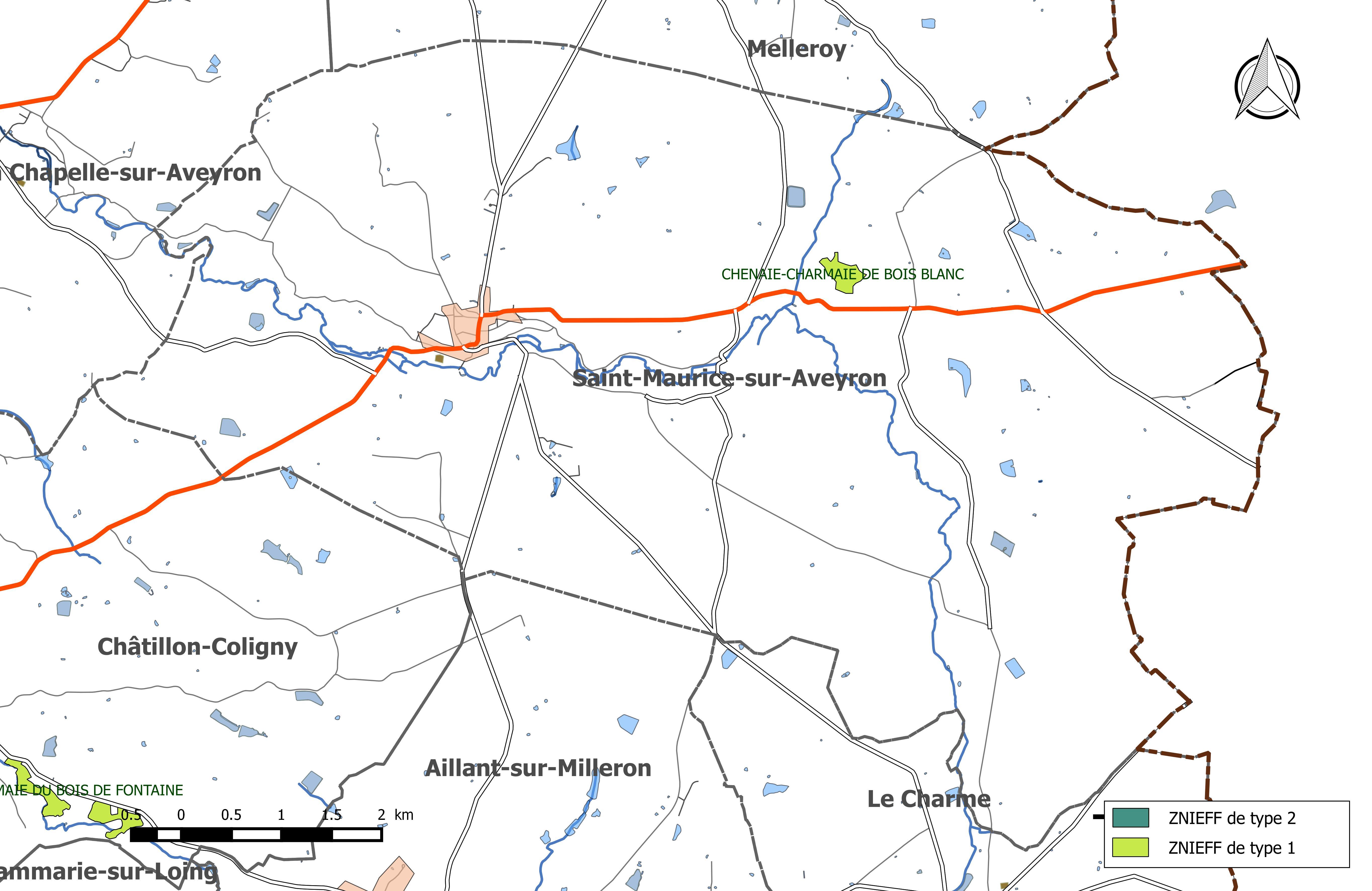 Carte des Zones naturelles d'intérêt écologique faunistique et Floristique (ZNIEFF) de la commune de Saint-Maurice-sur-Aveyron.